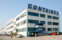 Bürogebäude des Unternehmens CONTAINEX Containerhandelsgesllschaft Quelle: Autor: Madiron Erstellt: 20.07.2006, A-2355 Wr. Neudorf